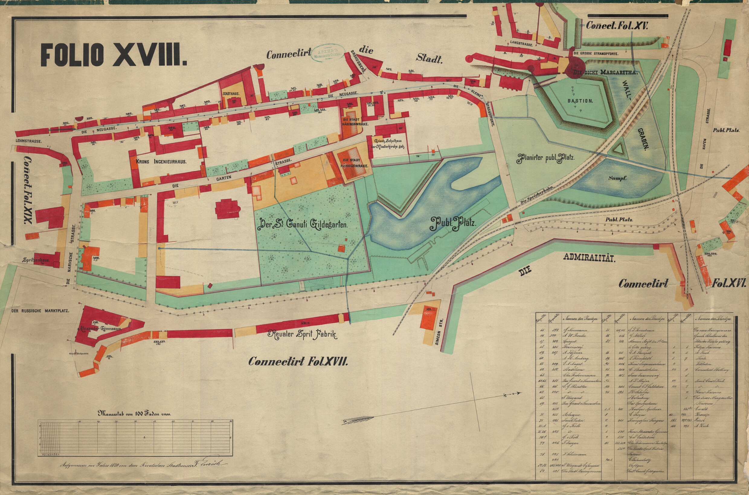 Leht 1 Fol XVIII. Von der Lehmpforte zur grossen Strandpforte. Die publ. Plätze an der Promenade